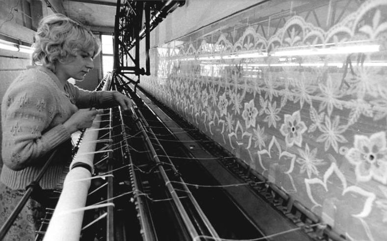 ADN-ZB-Thieme 17.11.1980 -Bez. Karl-Marx-Stadt: Jubiläum hat in diesen Wochen ein Erzeugnis, das vor 100 Jahren unter dem Begriff Plauener Spitze weltweit bekannt wurde. Im modernen VEB Plauener Spitze arbeitet Ursula Weidenmüller an dieser Stickmaschine mit einer Arbeitsbreite von zweimal 13,5 Metern. Hier entstehen hochwertige gestickte Gardinen. Auch Spitzentaschentücher und modische Spitze für Damenoberbekleidung gehören zur Produktionspalette des Betriebes, dessen Erzeugnisse heute in über 40 Ländern der Erde gefragt sind.